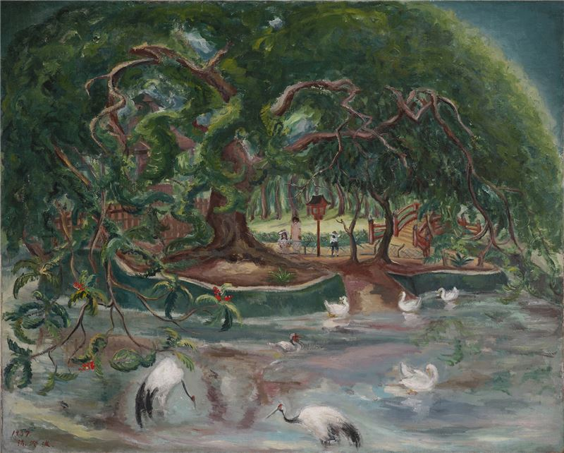 收藏於國立臺灣美術館的國家重要古物 陳澄波〈嘉義公園〉，或稱〈嘉義遊園地〉，亦是國立臺灣美術館的鎮館之寶